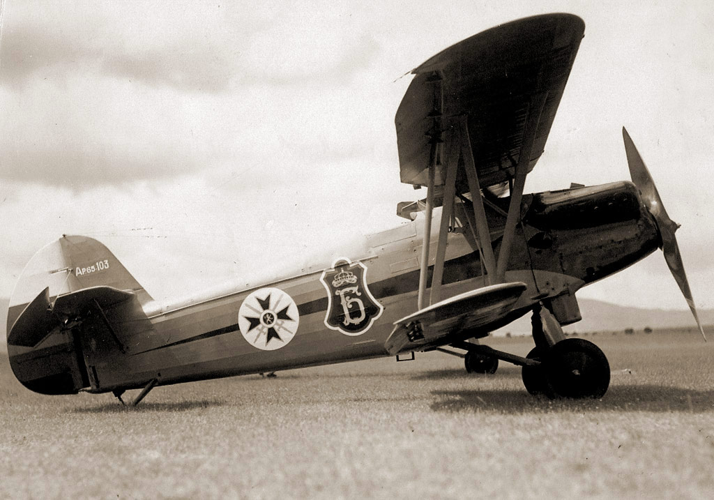 Bulgarisches Jagdflugzeug Arado AR65 Български изтребител Арадо АР65 (Arado Ar65)